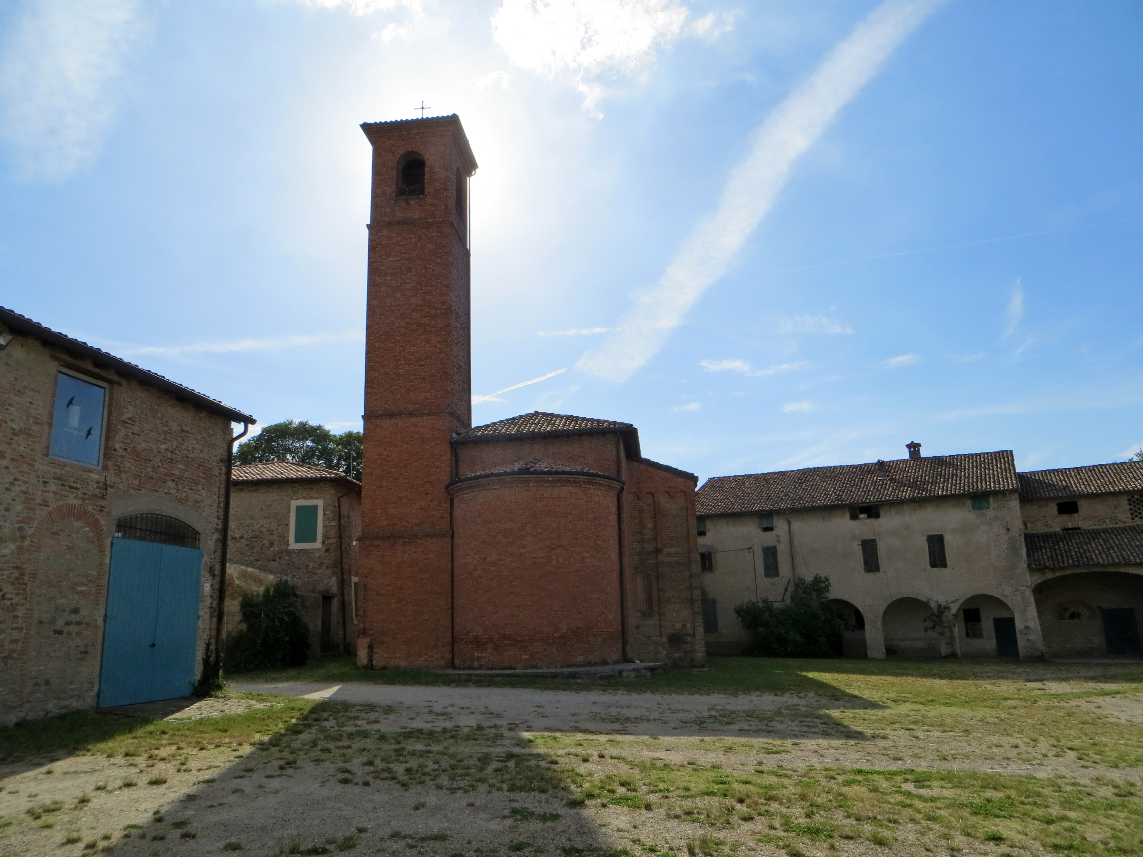 Chiesa di San Nicomede (Giarola, Collecchio) - abside e campanile